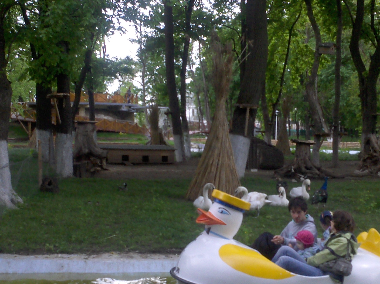 isla con pajaros en roman